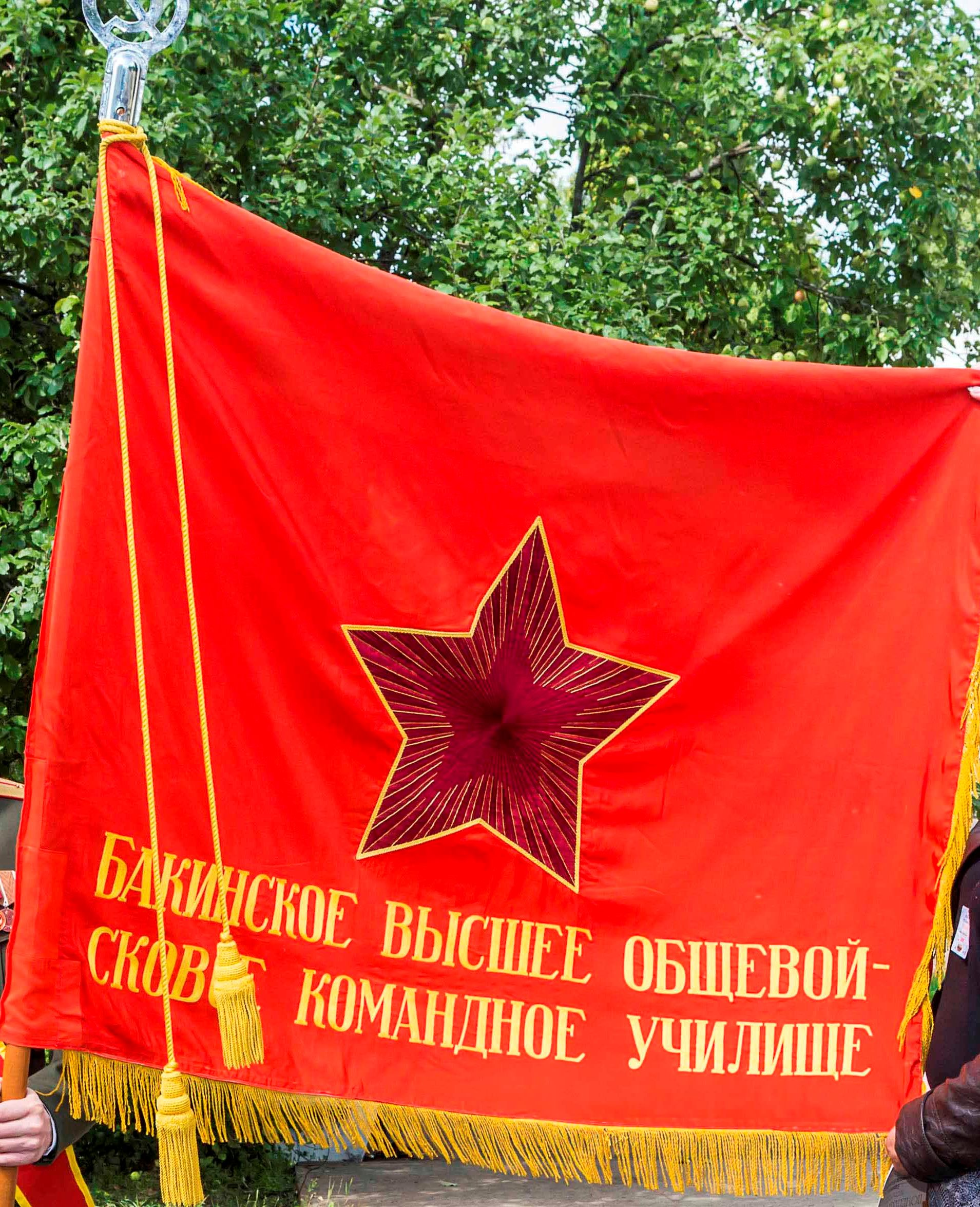 Боевое знамя Бакинского ВОКУ, 2013 г.